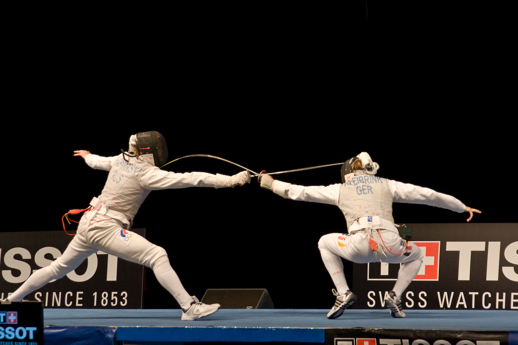 Prise le 7 juillet 2007 aux Championnats d'Europe d'escrime, à Gand (Flandre-Orientale) en Belgique. Benjamin Kleibrink, champion d'Europe par équipe au fleuret